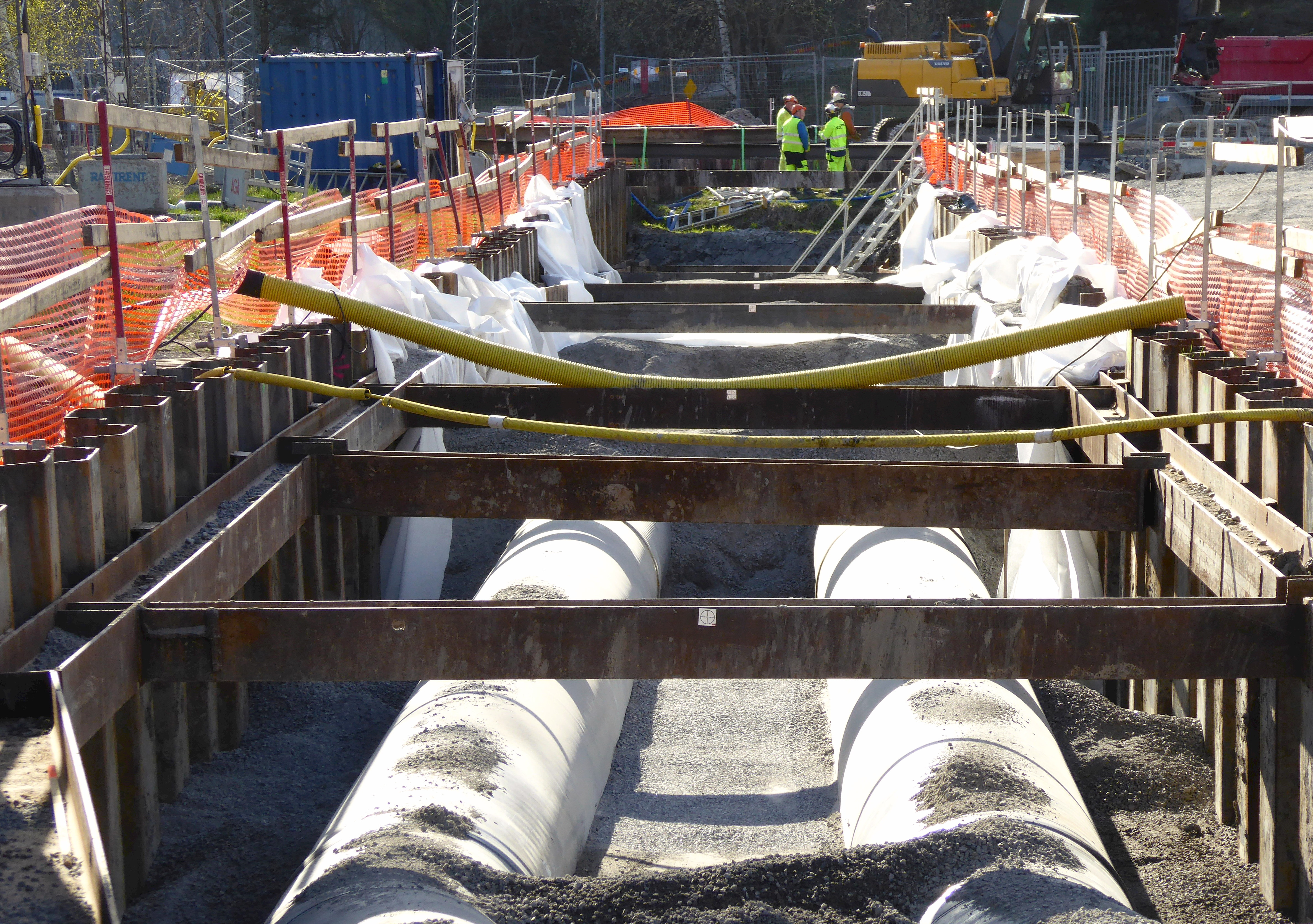 Stockholms huvudvattenledning i Segeltorp